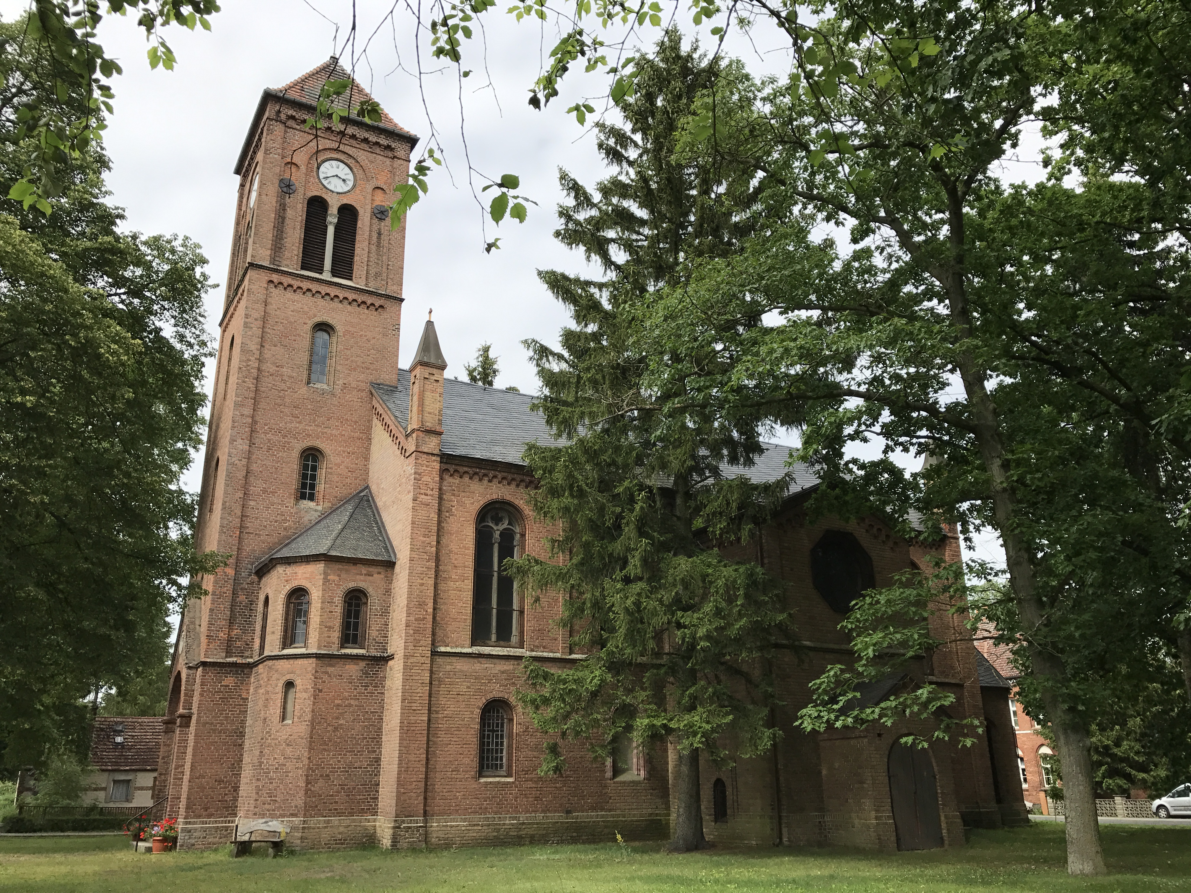 Die Dorfkirche in Selchow ist ein neuromanischer Bau, der in den Jahren 1865 und 1866 nach Friedrich August Stüler erbaut wurde. In dem Bauwerk in Storkow (Mark) befindet sich unter anderem ein Triptychon der Künstlerin Renate Niethammer.